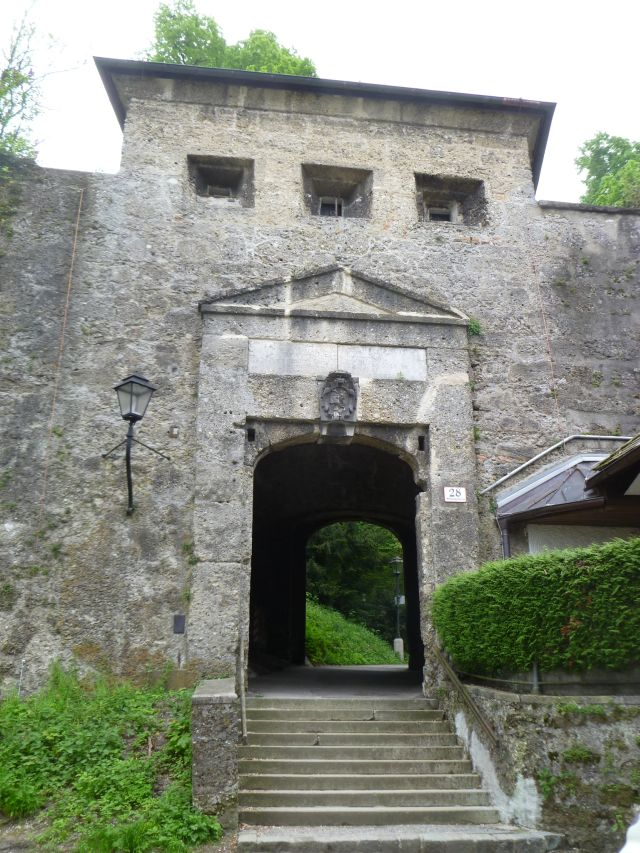 Augustinerpforte (Mönchsberg)